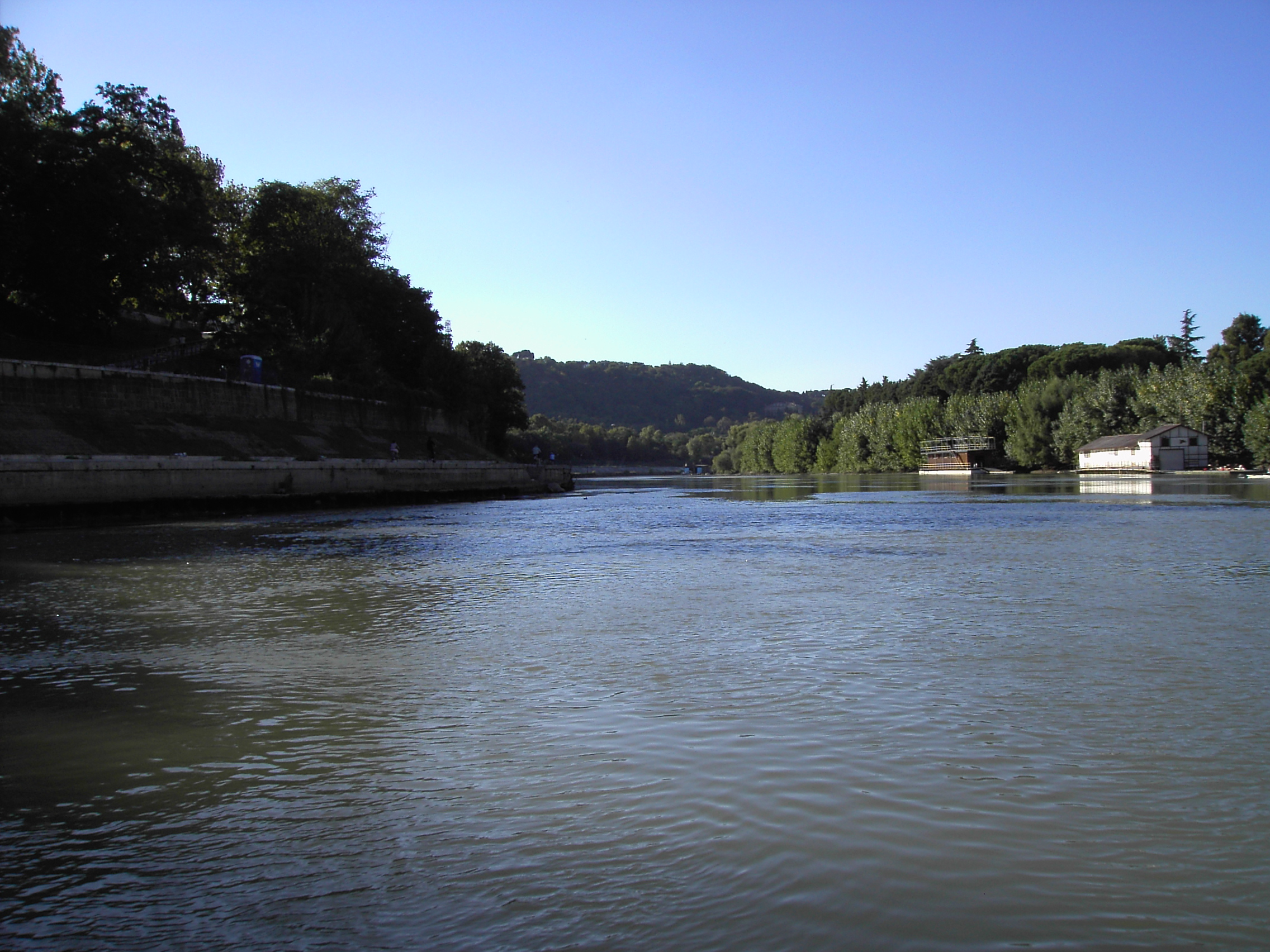 Roma, Tevere largo sotto Monte Mario